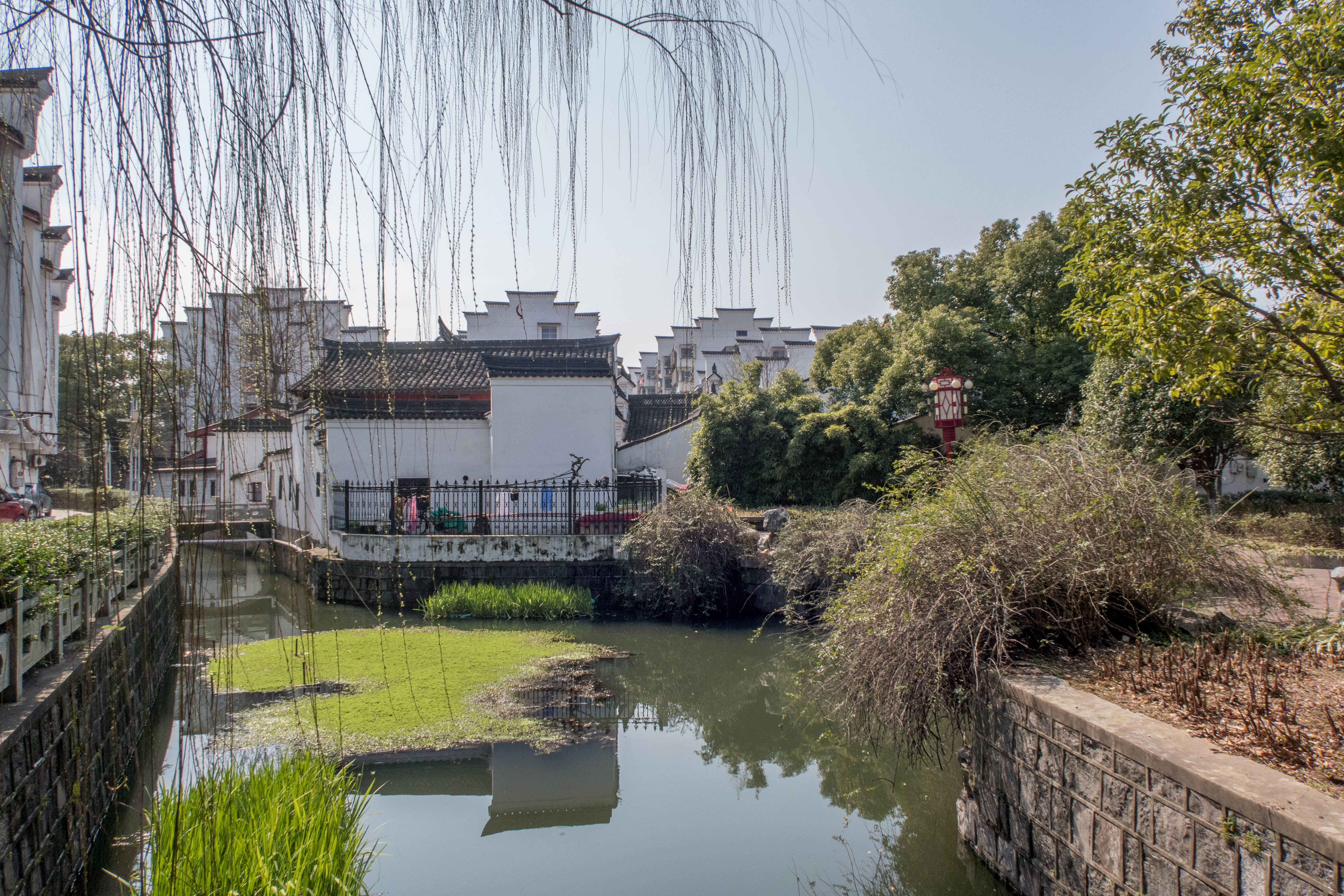 镇海朱仁房大屋